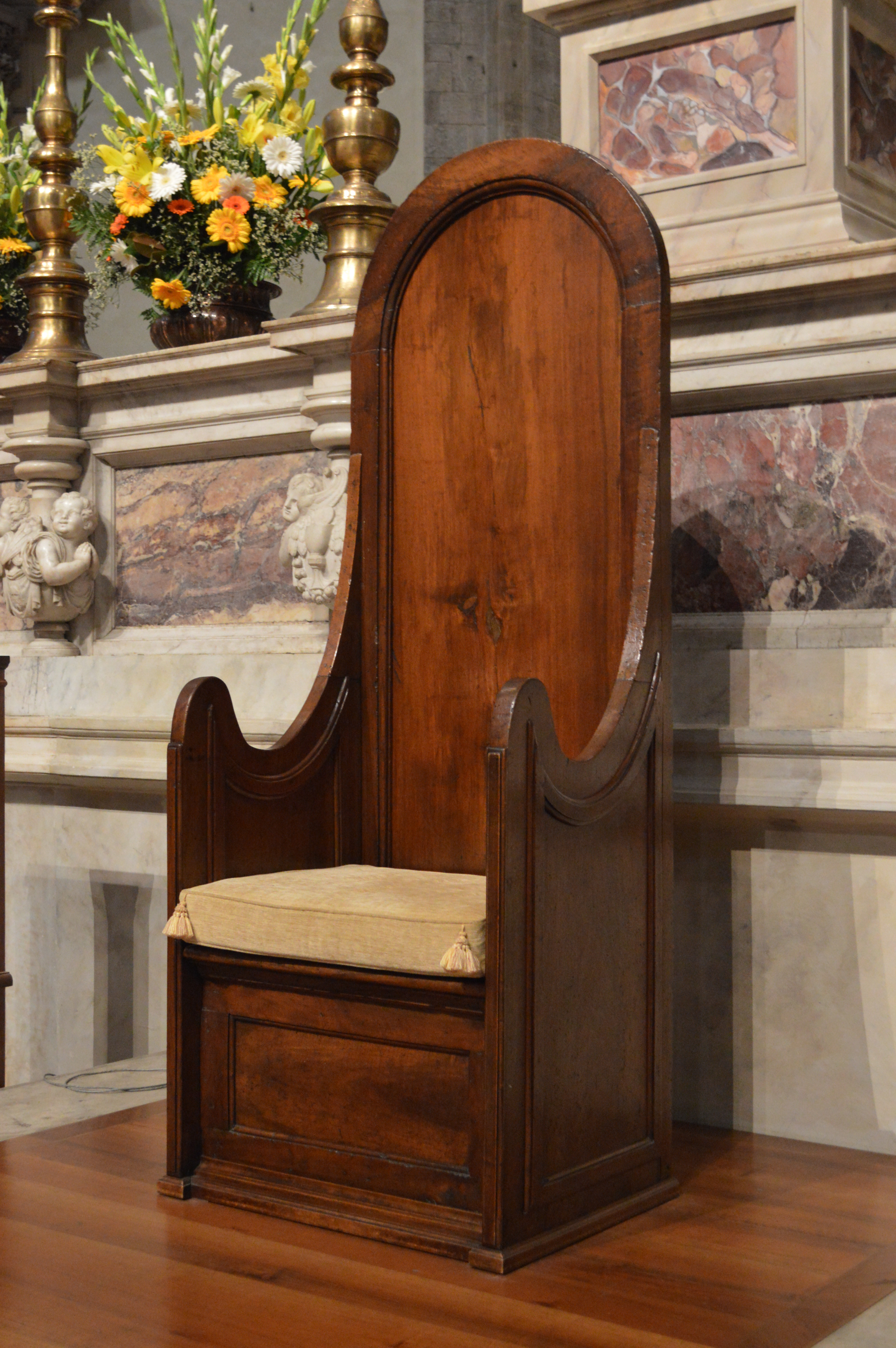 La cattedra arcivescovile (XV secolo).